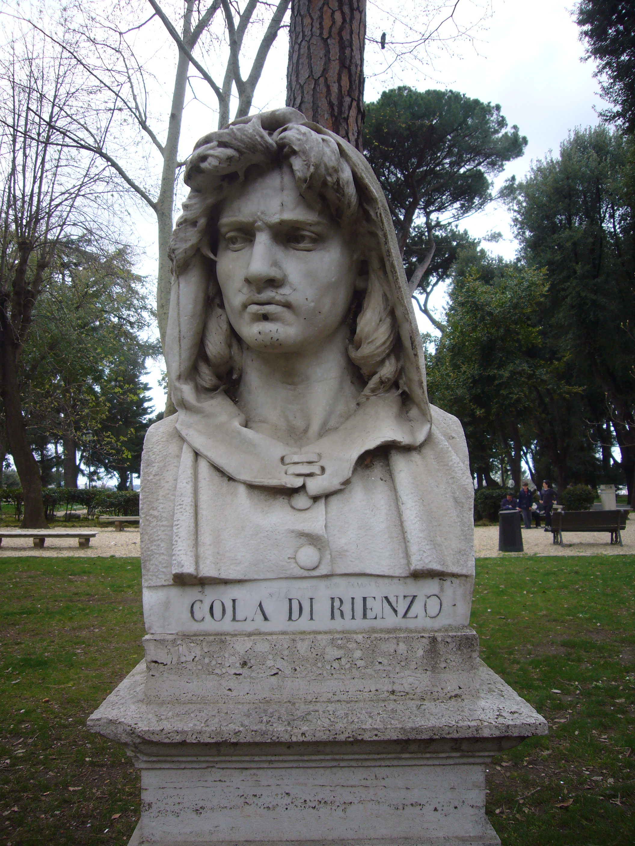 Roma, Pincio. Busto di Cola di Rienzo